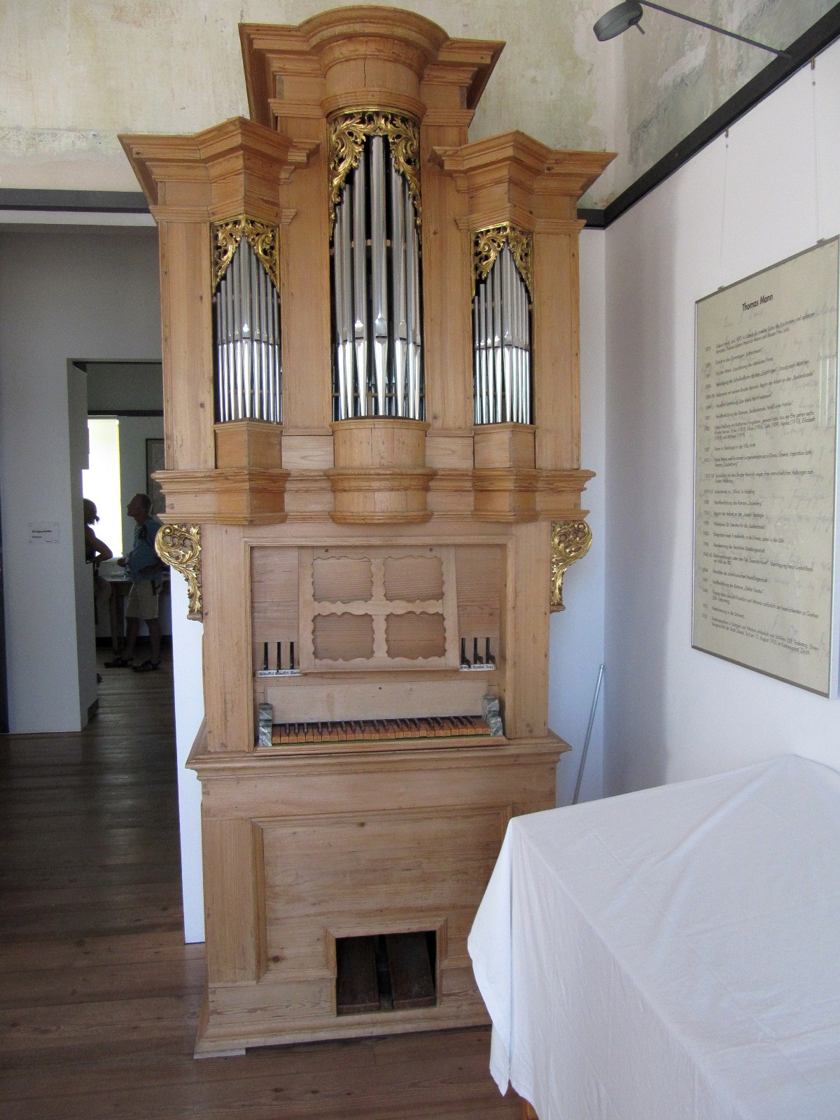 Orgel von Philipp Franz Schleich, für die Kirche St. Nikolaus auf der Ilkahöhe. Derzeitiger Standort im Ortsmuseum Tutzing.